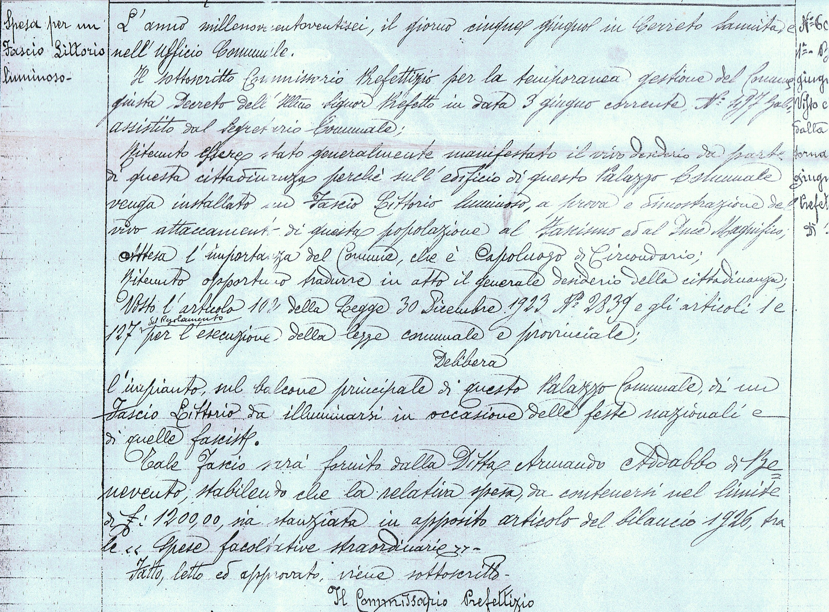 Delibera del Commissario Prefettizio del comune di Cerreto Sannita con la quale si stabilisce l'installazione sul palazzo municipale di un fascio littorio luminoso (Archivio comunale di Cerreto Sannita).